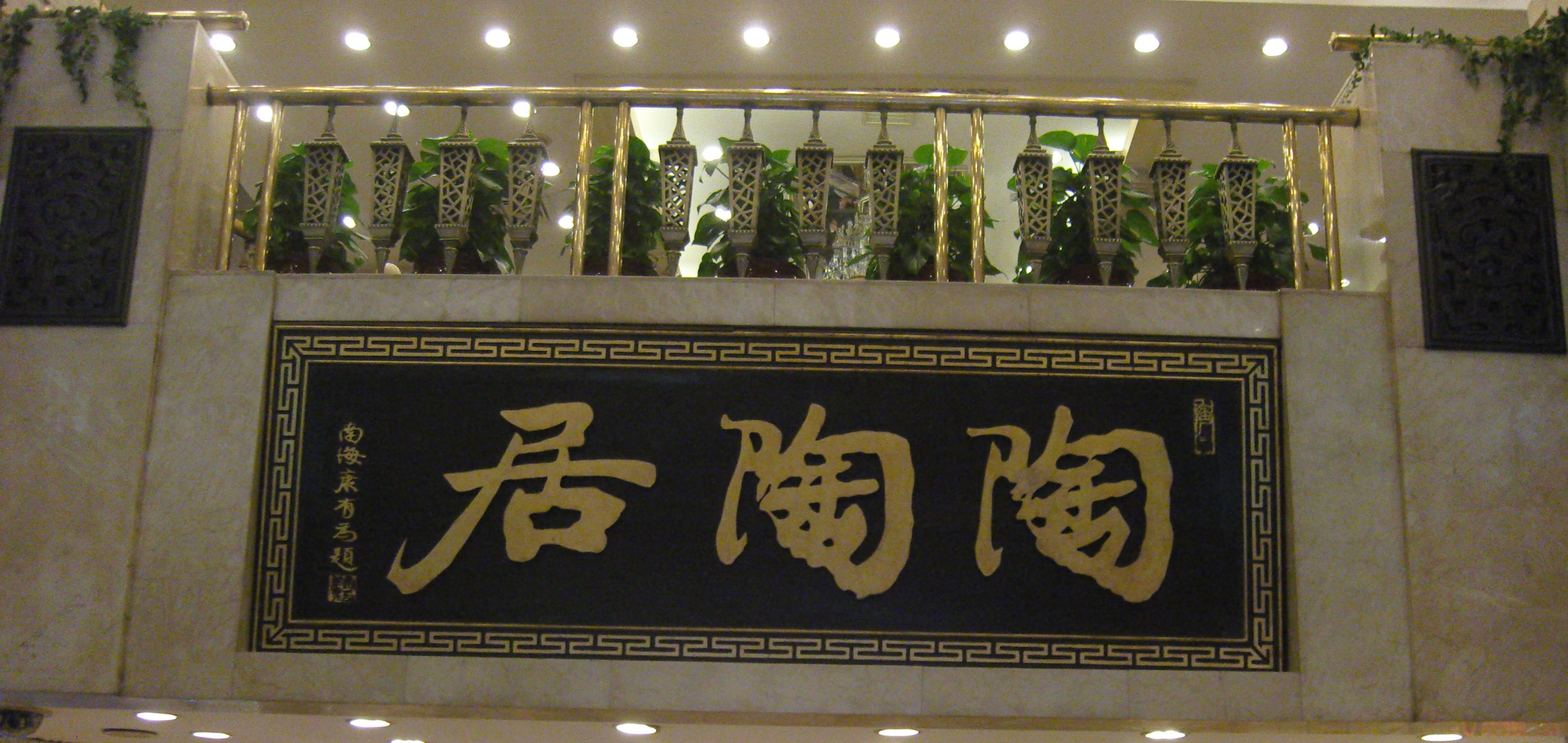 廣州陶陶居的招牌